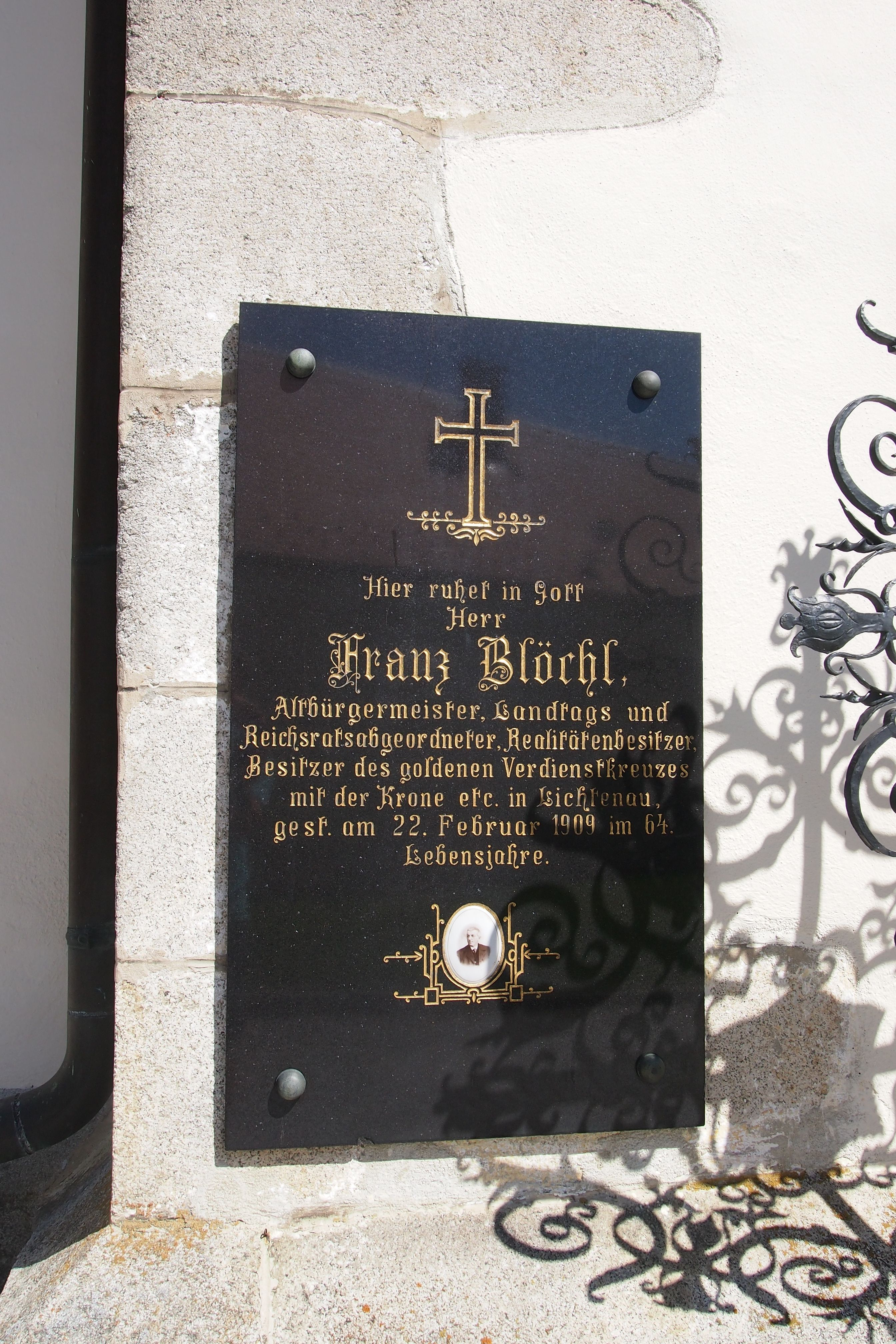 Grabstein Blöchl an Pfarrkirche Grünbach